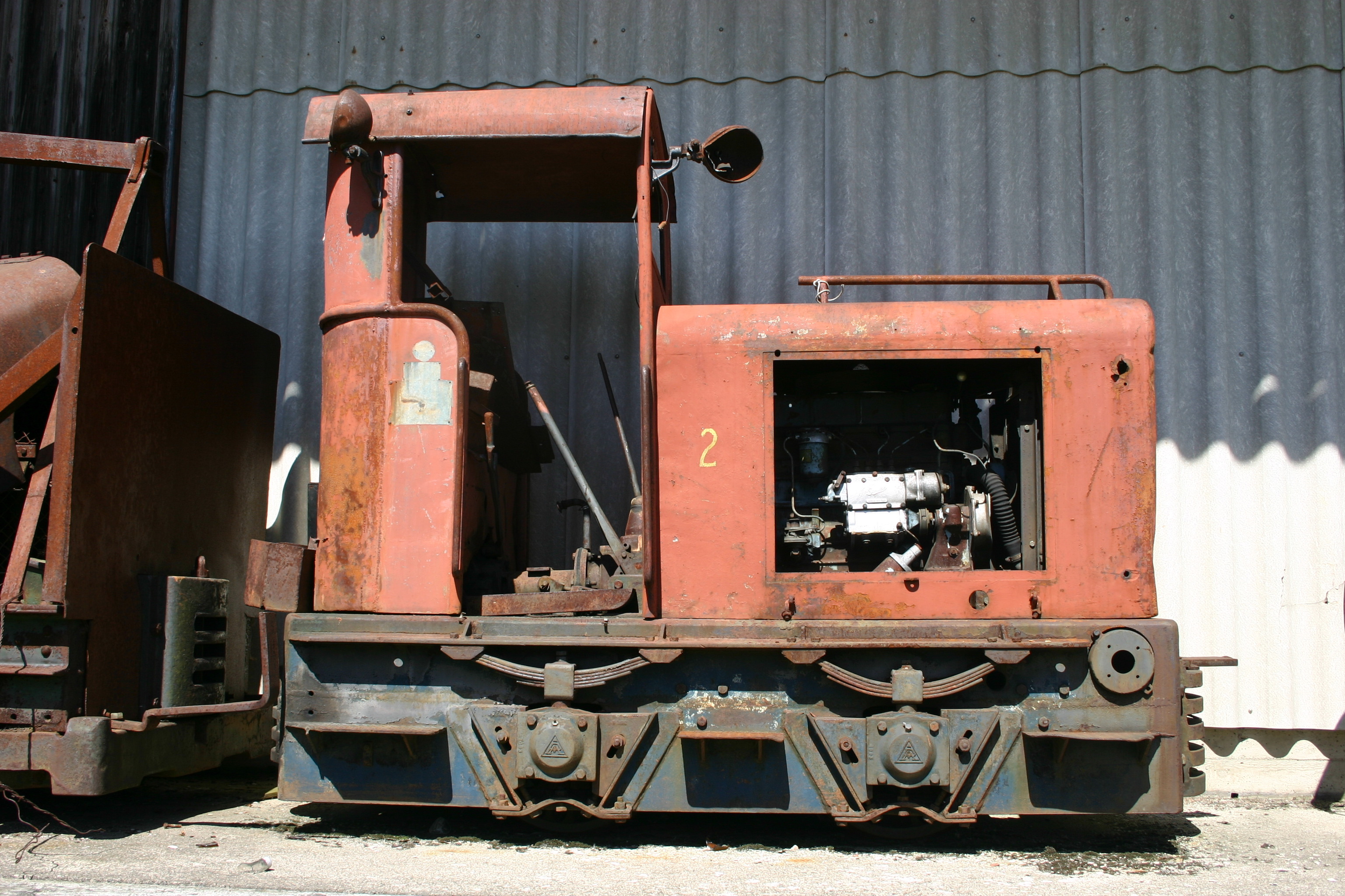 Description